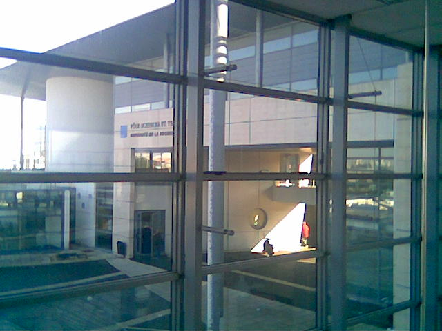 Batiment des Sciences de l'Université de La Rochelle (France).